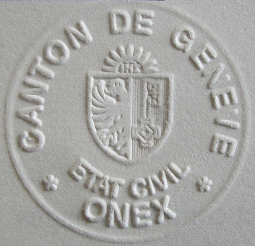 Sceau apposé dans un livret de famille , à Onex (canton de Genève), en 2001. Diamètre de l'embossage 2.4 cm.